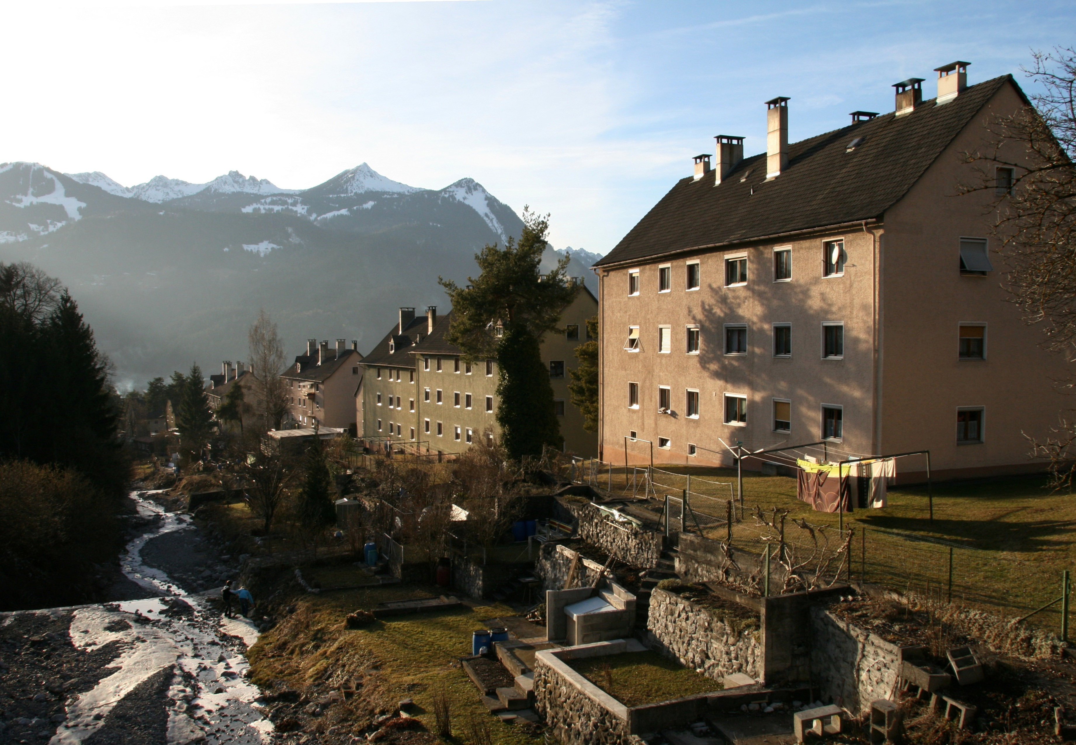 Südtiroler-Siedlung inBludenz, Vorarlberg.